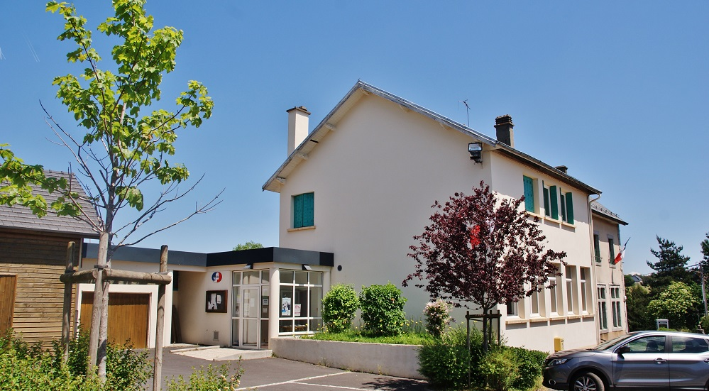 La Mairie